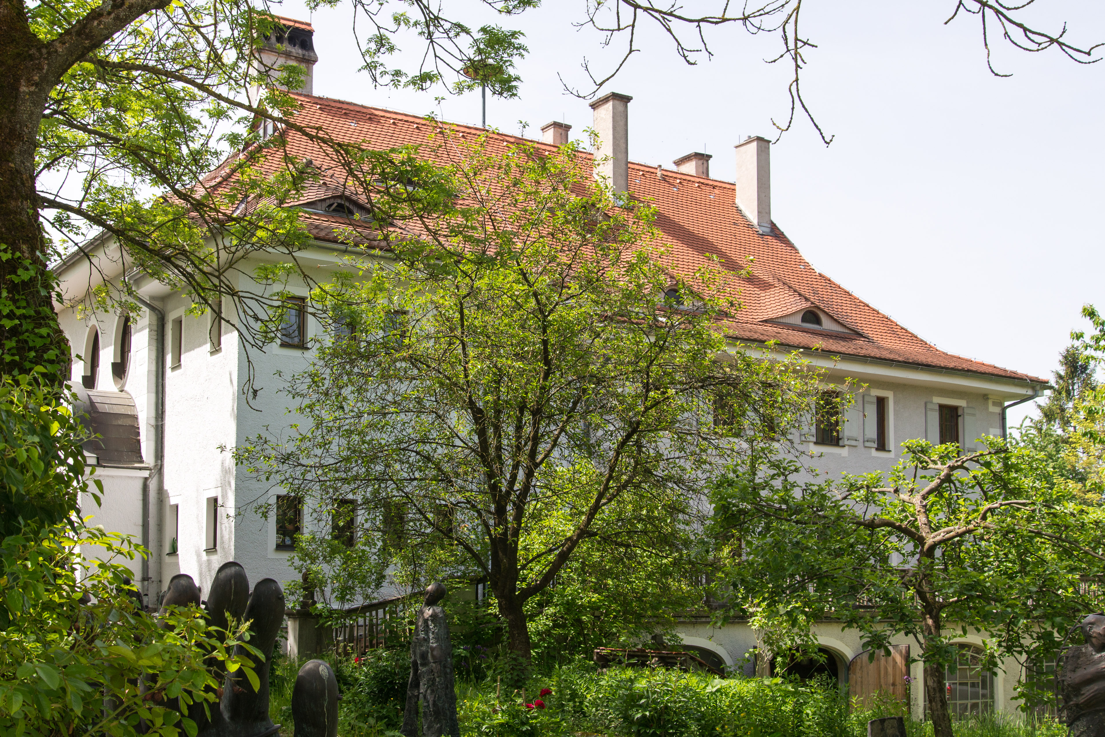 Schulhaus: ausgedehnte Anlage mit Walmdächern und Putzdekor, zweigeschossiger Bau, teilweise über Sockelgeschoss mit Arkaden, südöstlich Erkerturm mit Zeltdach, Dekor mit Stilelementen des Historismus, 1909; am Platz des ehemaligen Schlosses. This is a photograph of an architectural monument.